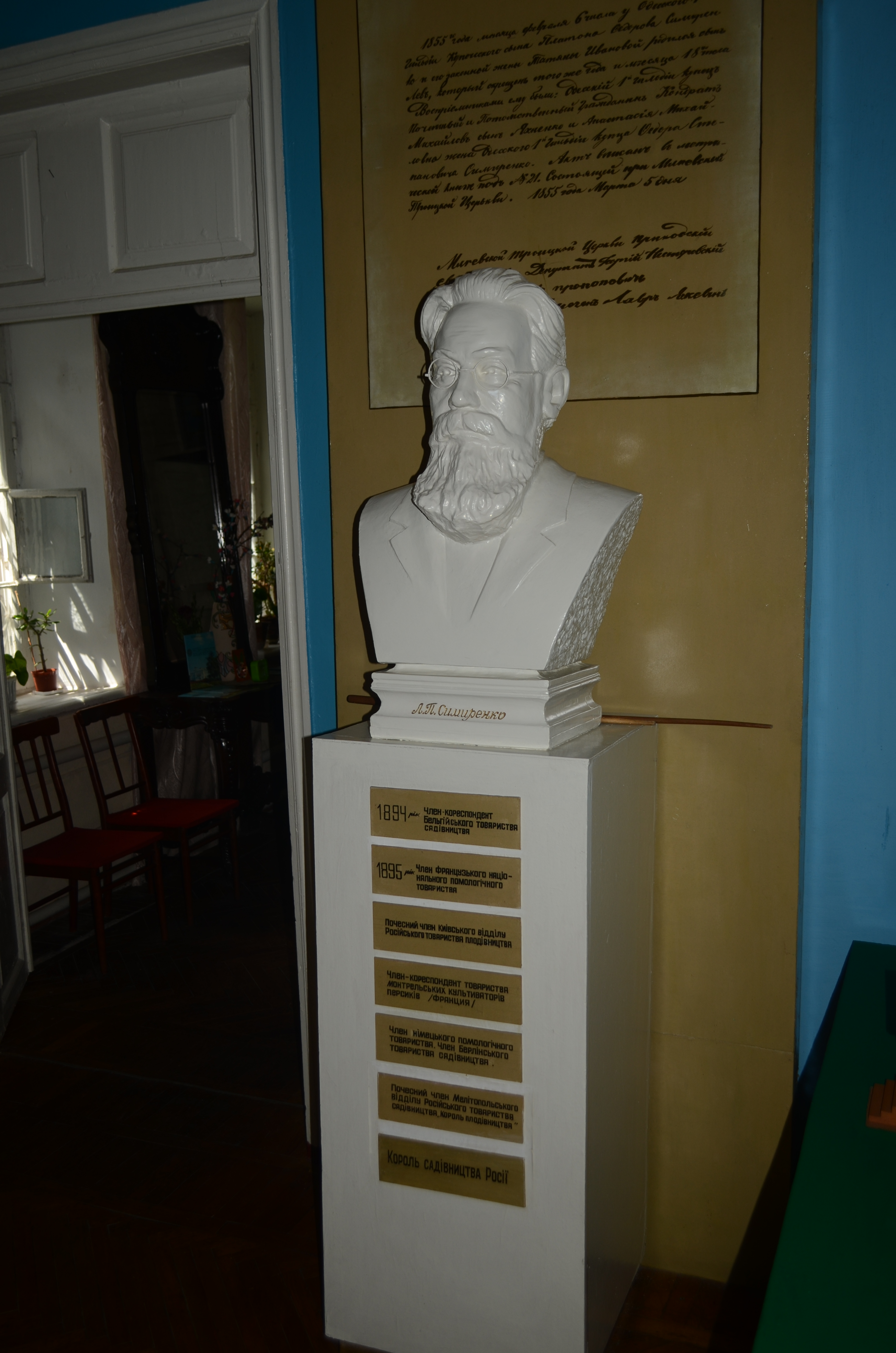 Бюст Л.П.Симиренко в музее в Млиеве со перечнем званий и заслуг